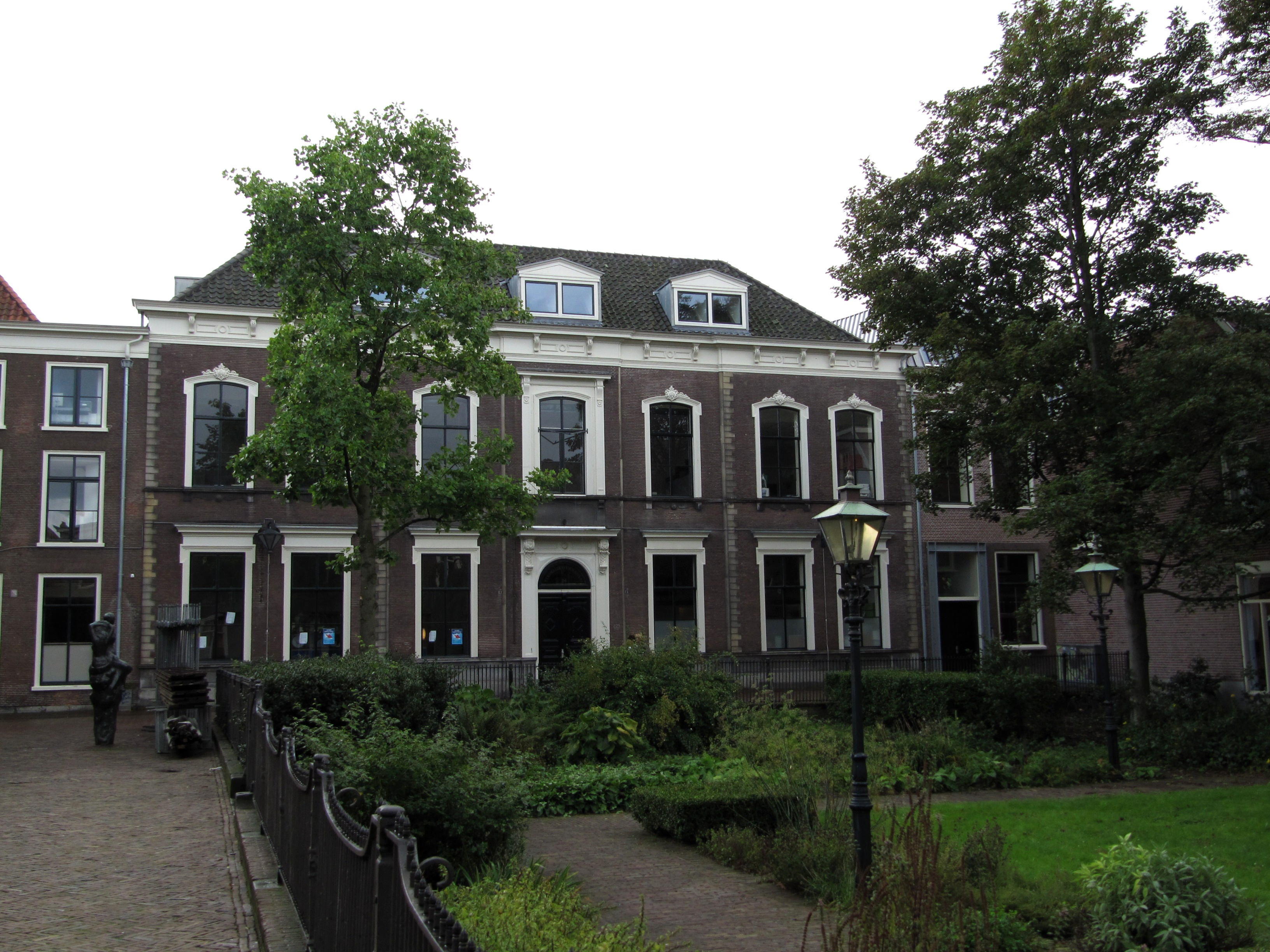 RM19296 Haarlem - Jacobijnestraat 24.jpg